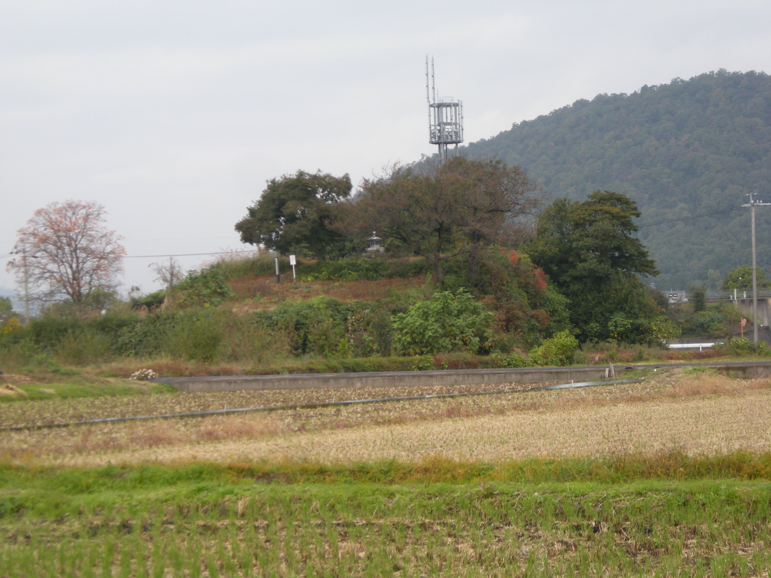 伝蘇我倉山田石川麻呂の墓（岐阜県各務原市）Said to be the tomb of Soga no Kurayamada no Ishikawa no Maro, Kakamigahara, Gifu, Japan 撮影:onaonan(Gifu,Japan) =画像投稿者(onaonan) Category:各務原市の画像